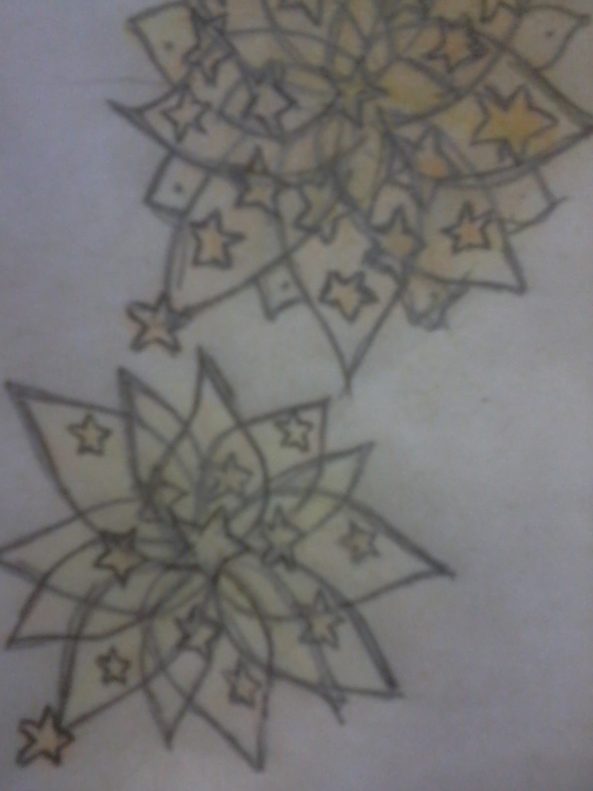 Flor del bosque de Lothlórien